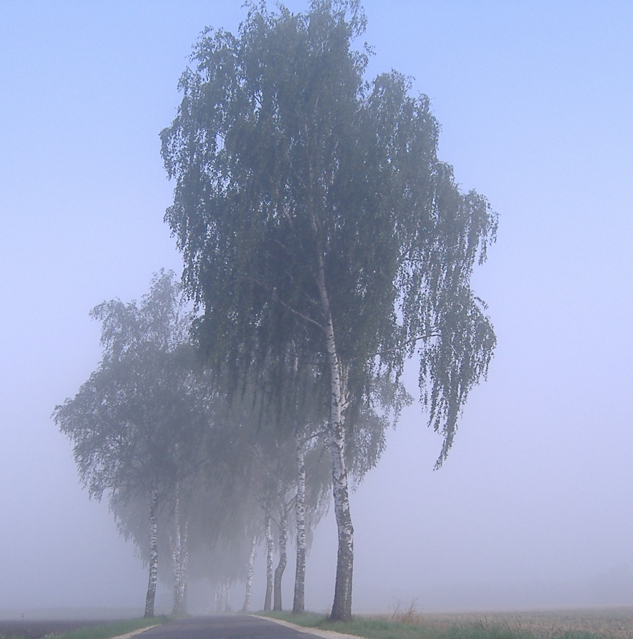 Birkenallee im Donauried, zwischen Steinheim und Kicklingen